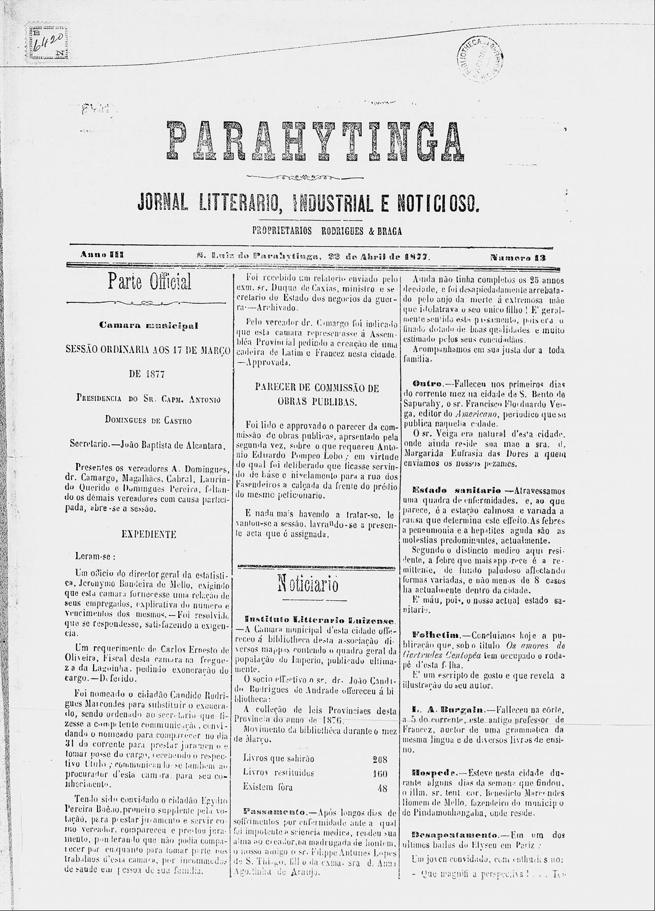 Parahytinga